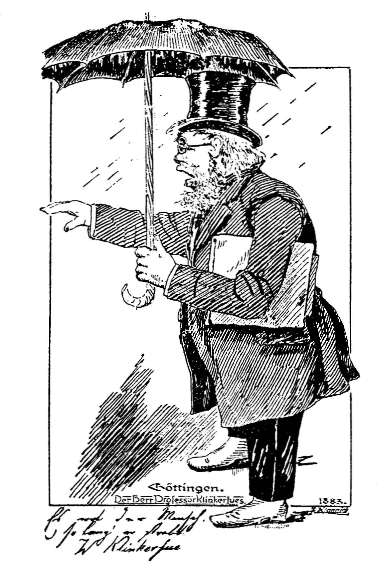 Wilhelm Klinkerfues, Karikatur von F. Krannich aus seiner Ansichtskartenserie „Göttinger Originale“, 1883. – Die Karikatur bezieht sich auf eine der berühmten, falschen Wettervorhersagen von Wilhelm Klinkerfues.